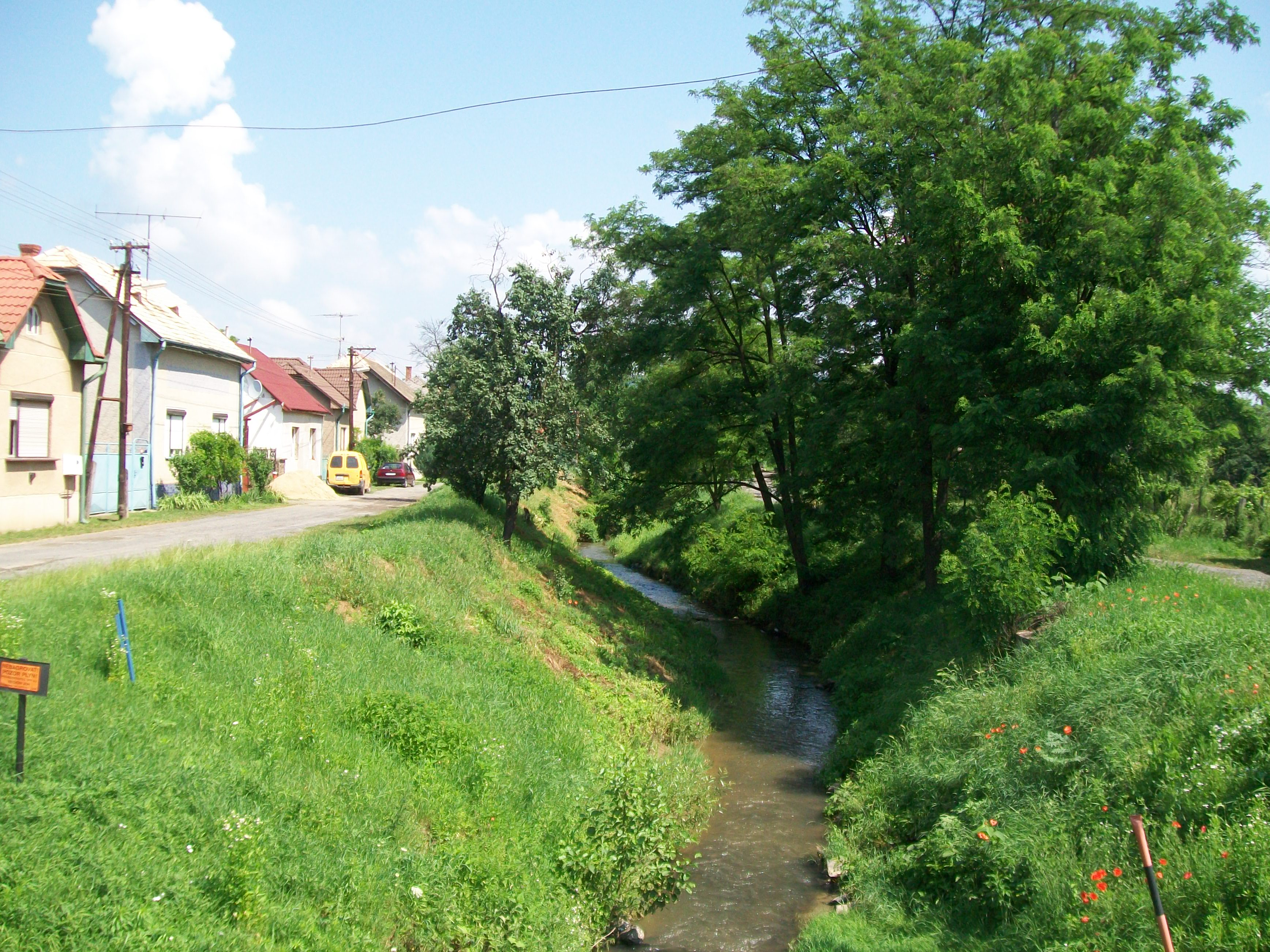 Potok Belina pretekajúci obcou Belina (okr. Lučenec)